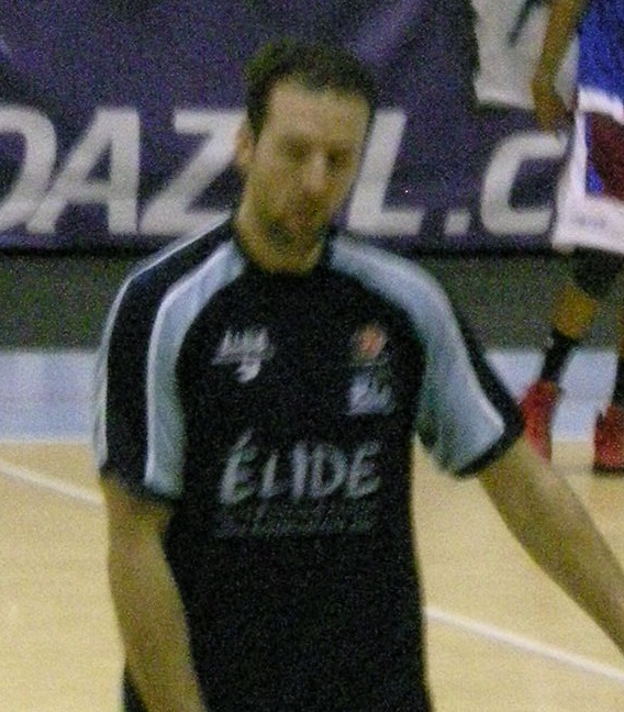 Fotografía de José Amador co Breogán no Pazo dos Deportes.